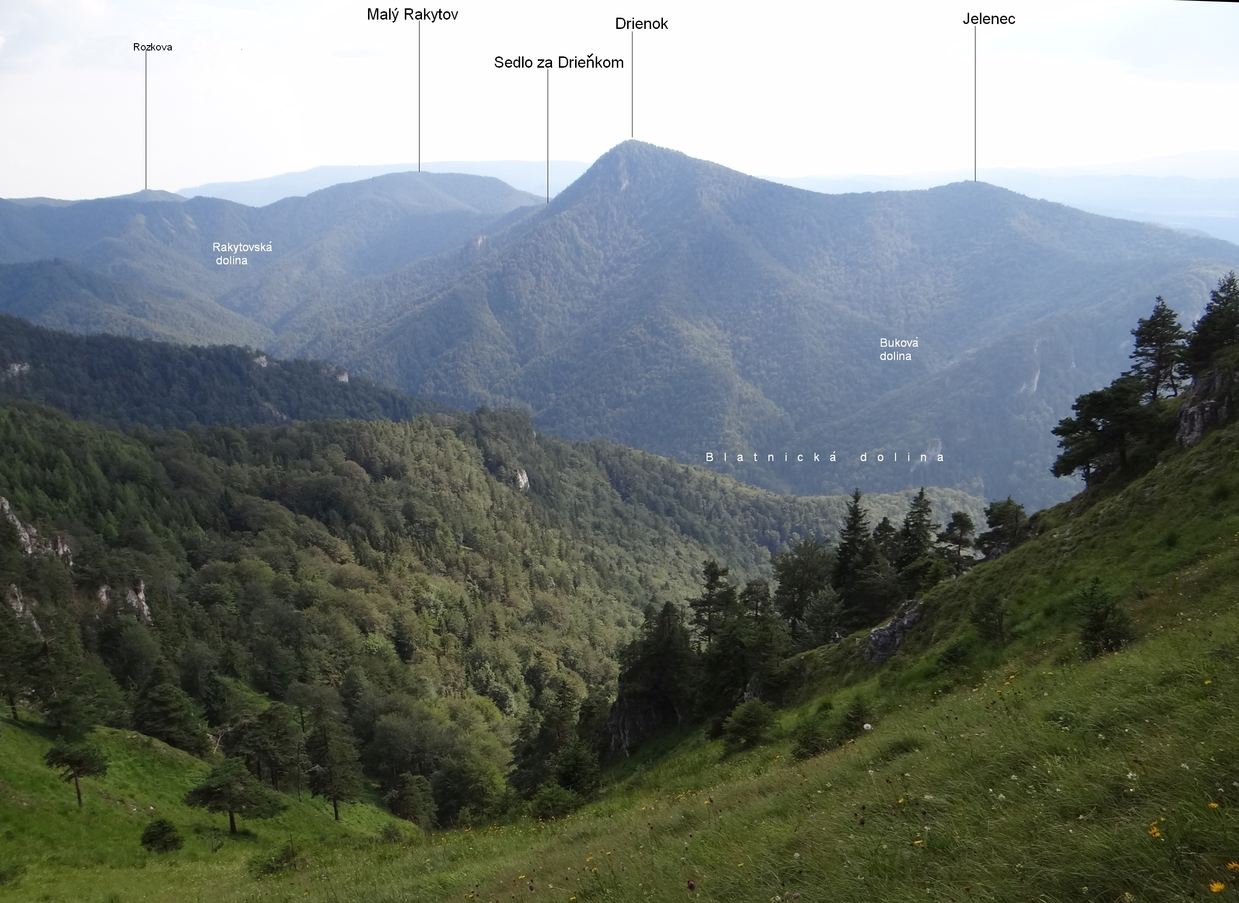 Drieňok i Blatnická dolina. Widok ze szczytu Ostrá